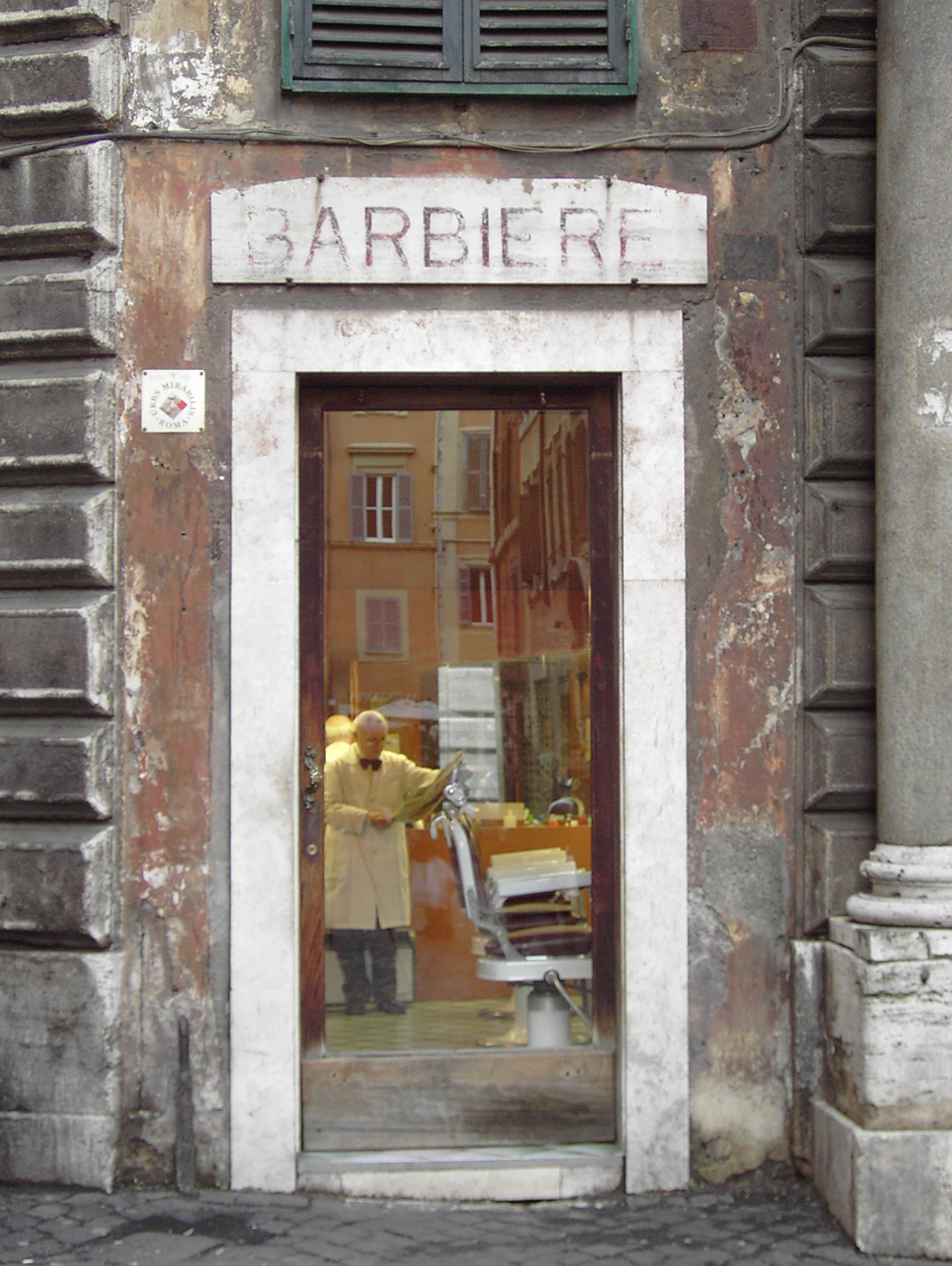 Rome, Barber Shop a via dei Portoghesi (palazzo Scapucci)